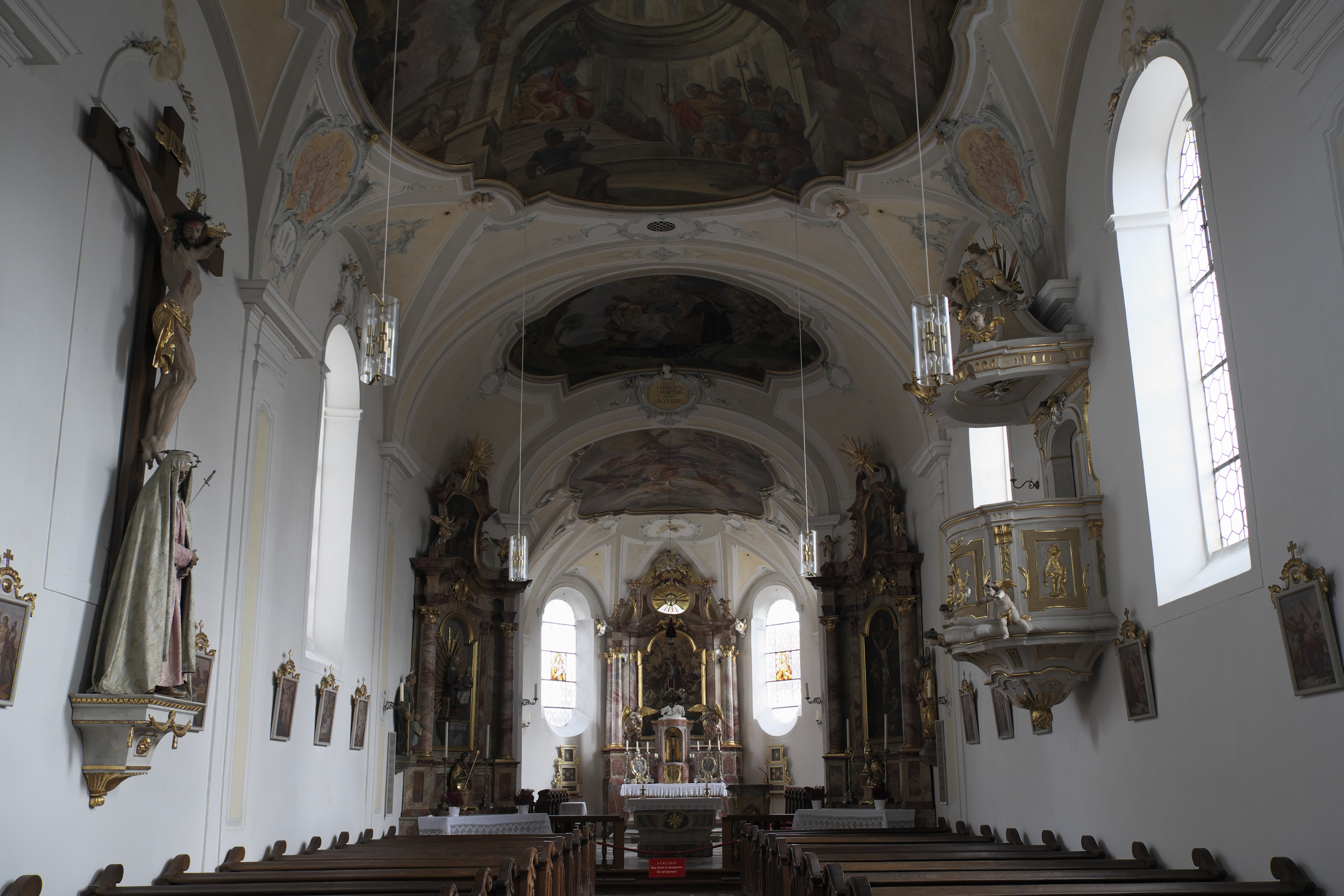 Katholische Stadtpfarrkirche St. Hippolyt im ehemaligen Ortsteil St. Pölten in Weilheim in Oberbayern im Landkreis Weilheim-Schongau (Bayern/Deutschland), Innenraum